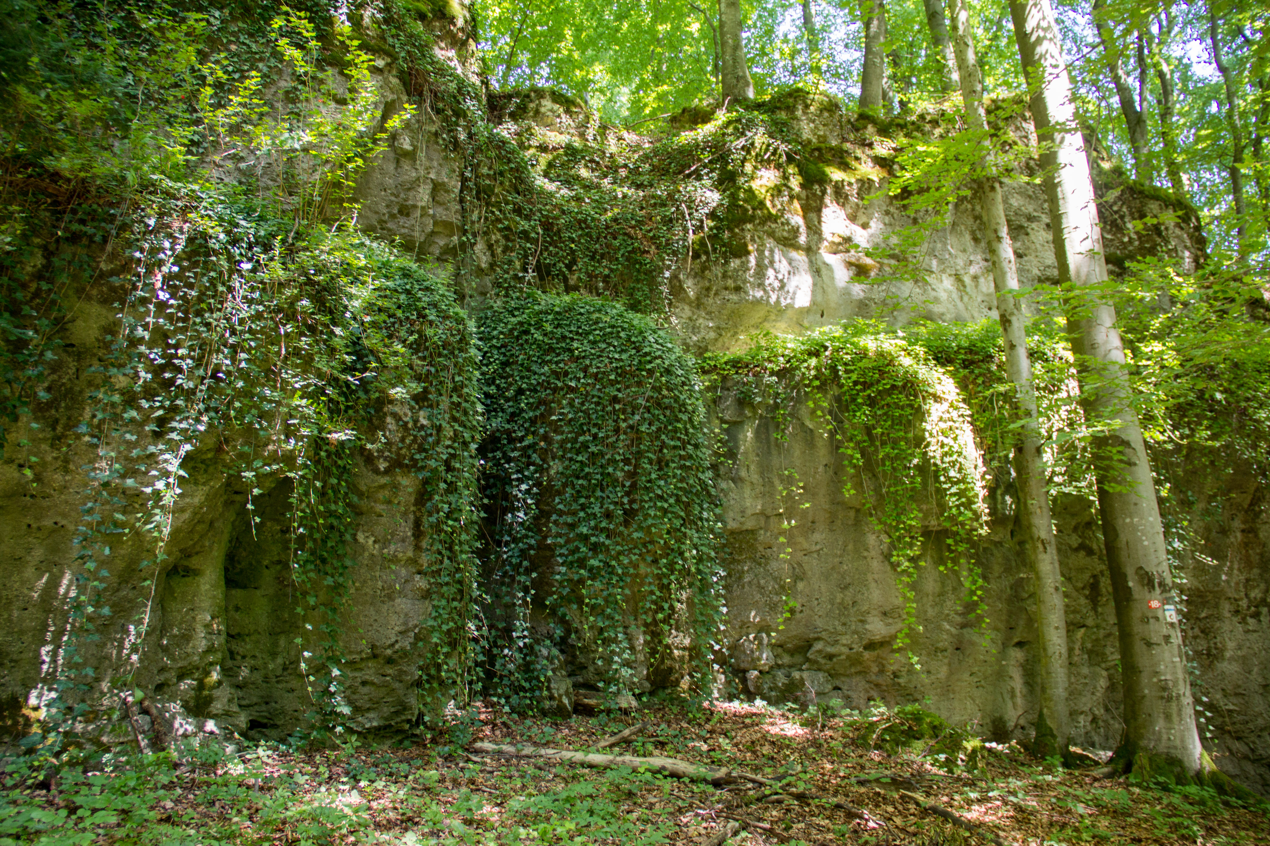 Dolomitfelsen, Steinberg, Königstein